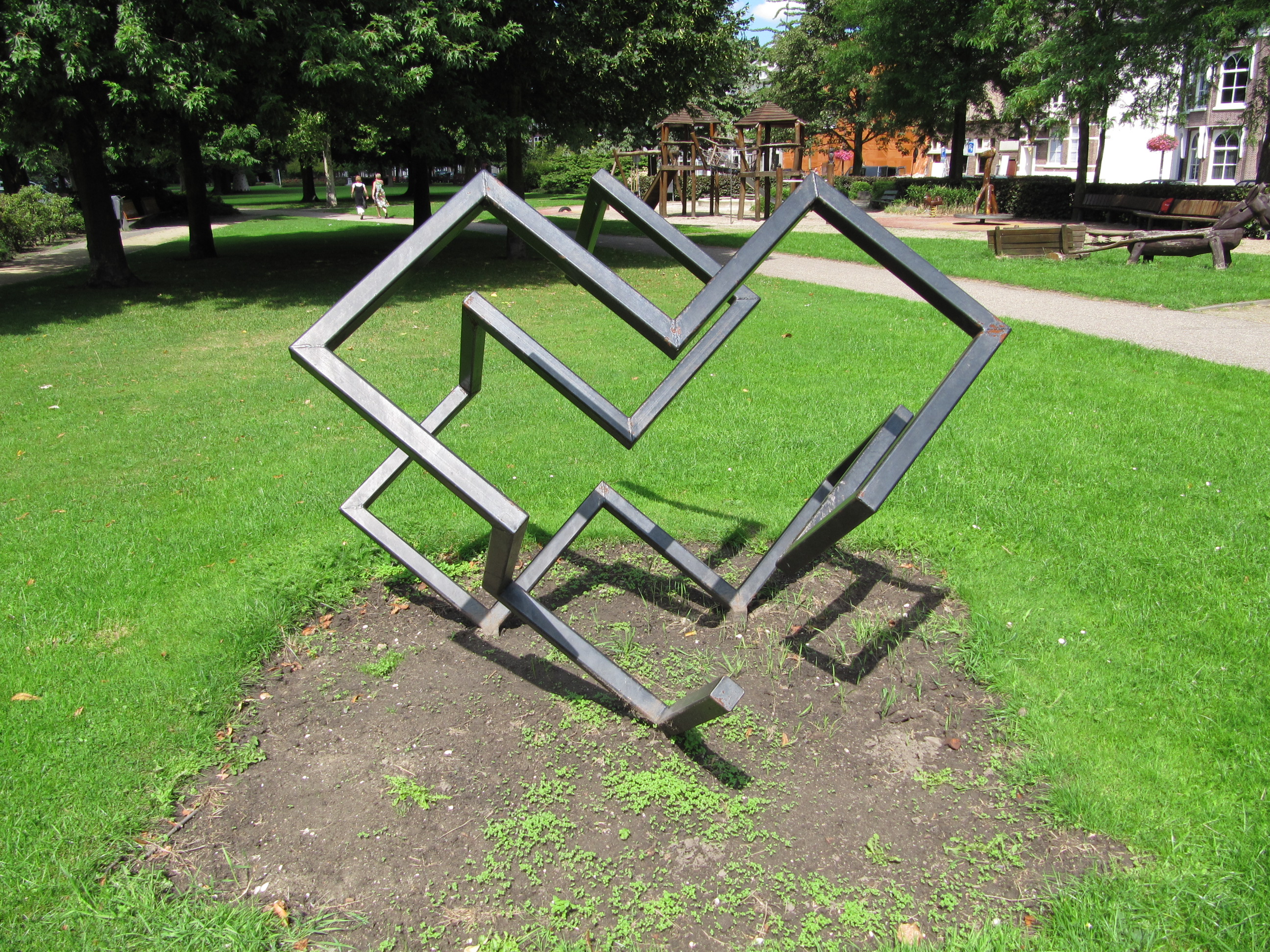 sculptures at Plantage park